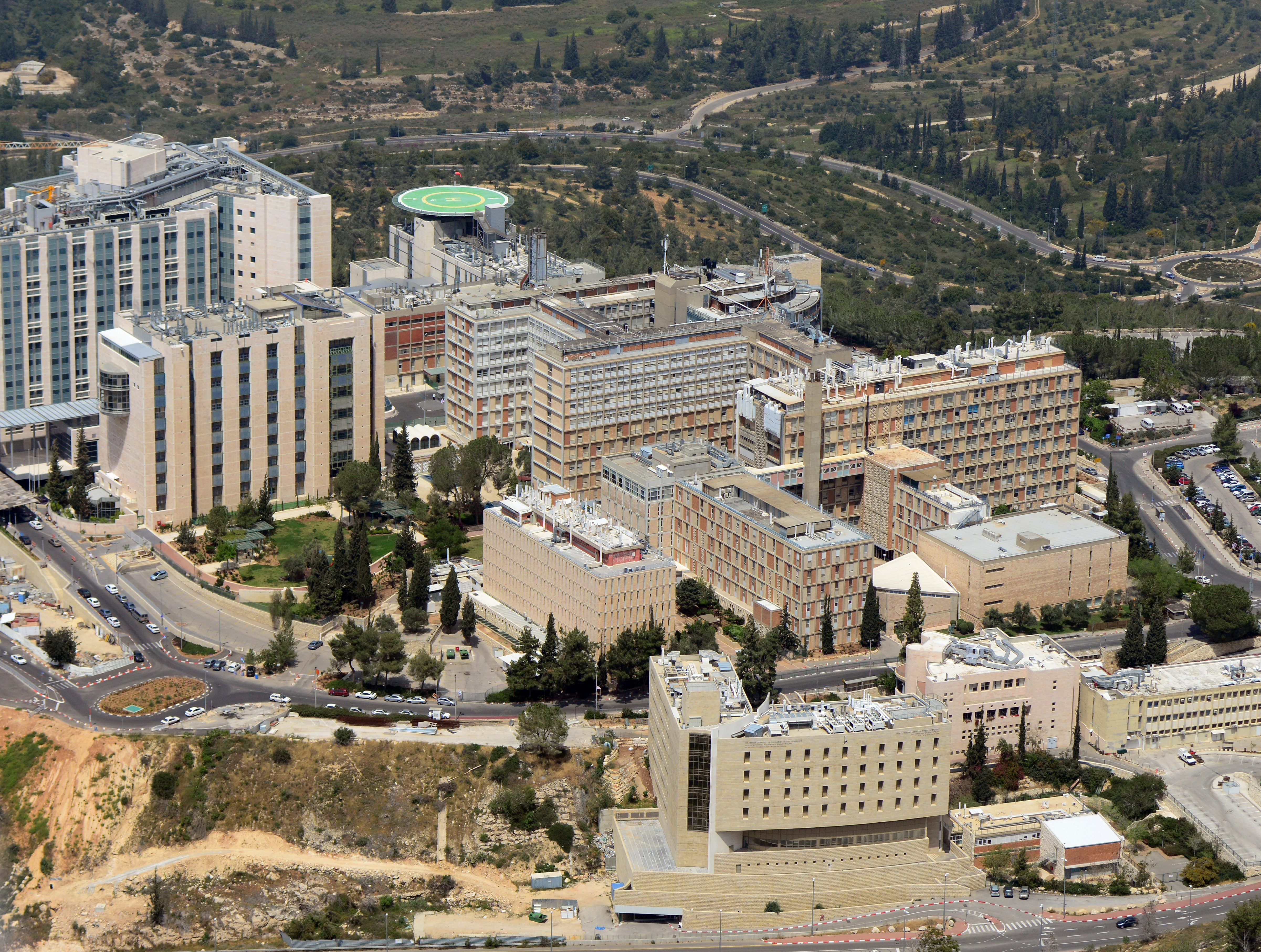 בית חולים הדסה עין כרם בתצלום אויר